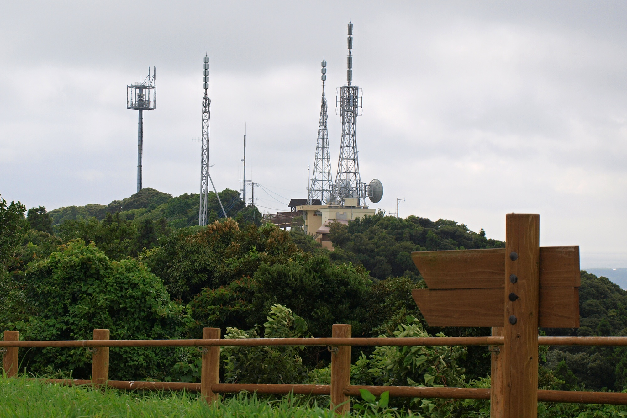 長崎県壱岐市 岳の辻 郷ノ浦中継局